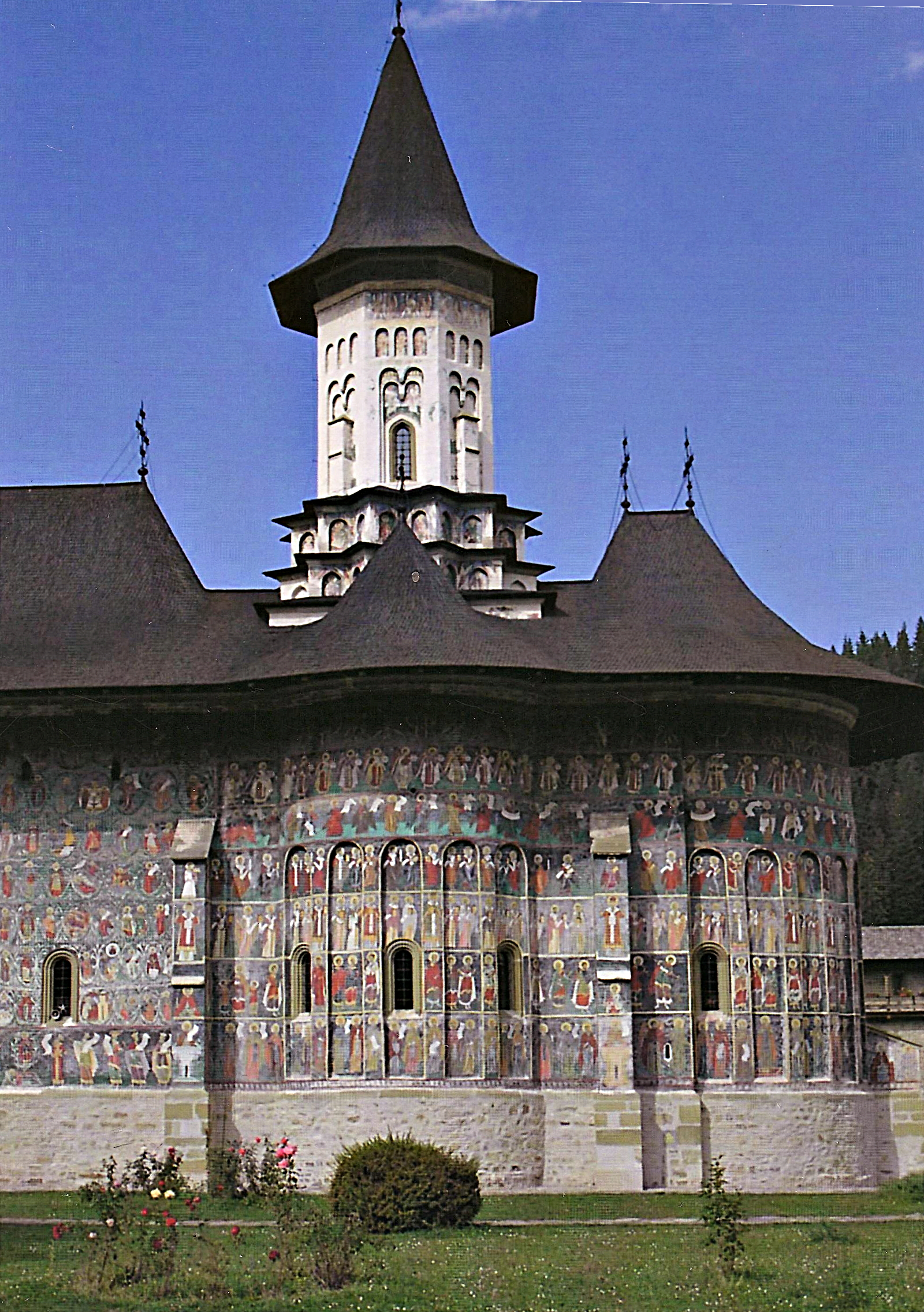 Sucevita: A kolostortemplom délkeleti homlokzata 01